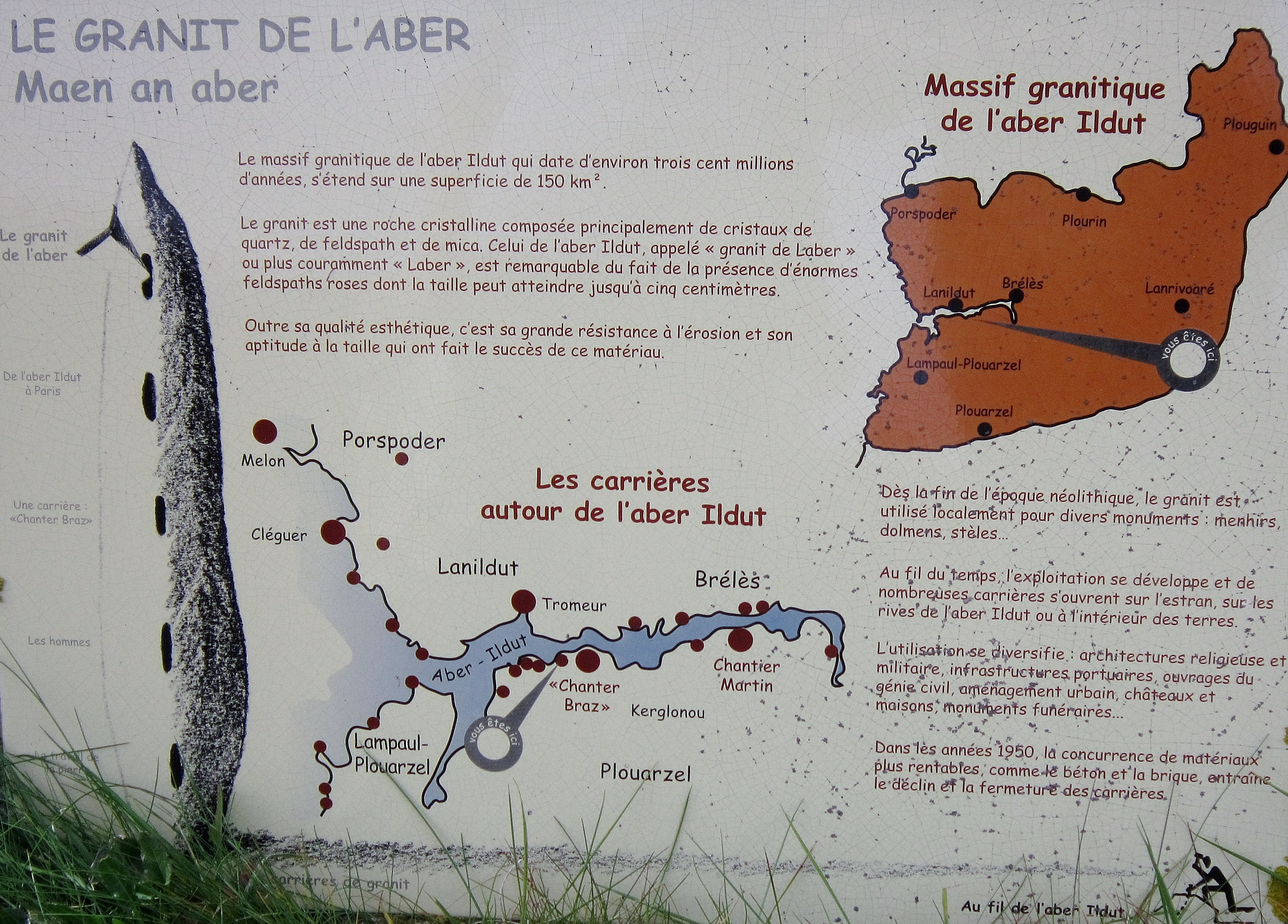 Panneau d'information touristique présentant le granite de l'Aber Ildut (situé dans l'ancienne carrière de Kerglonou [Chanter Braz] en Plouarzel).